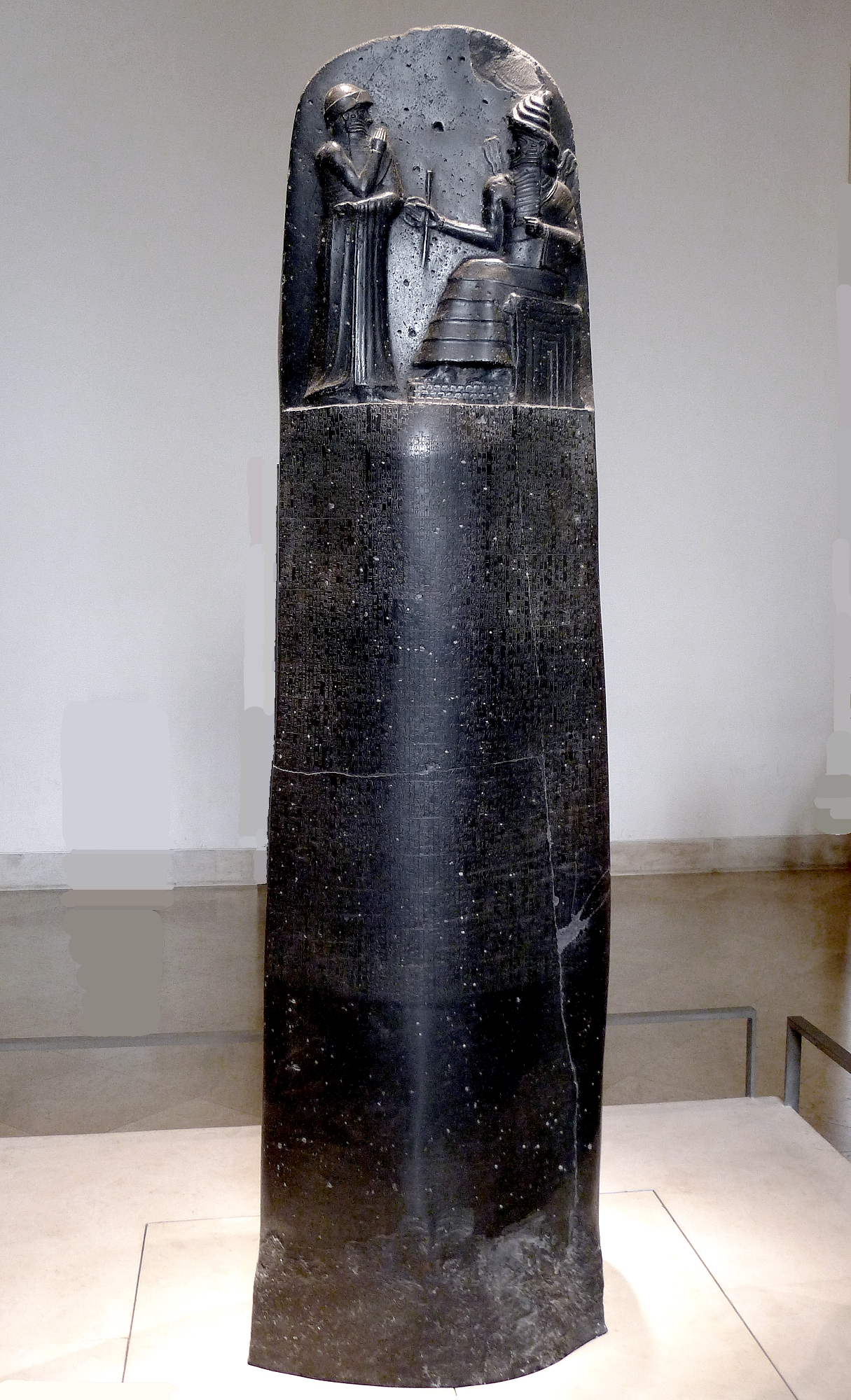 Code de Hammurabi, roi de Babylone ; face avant.